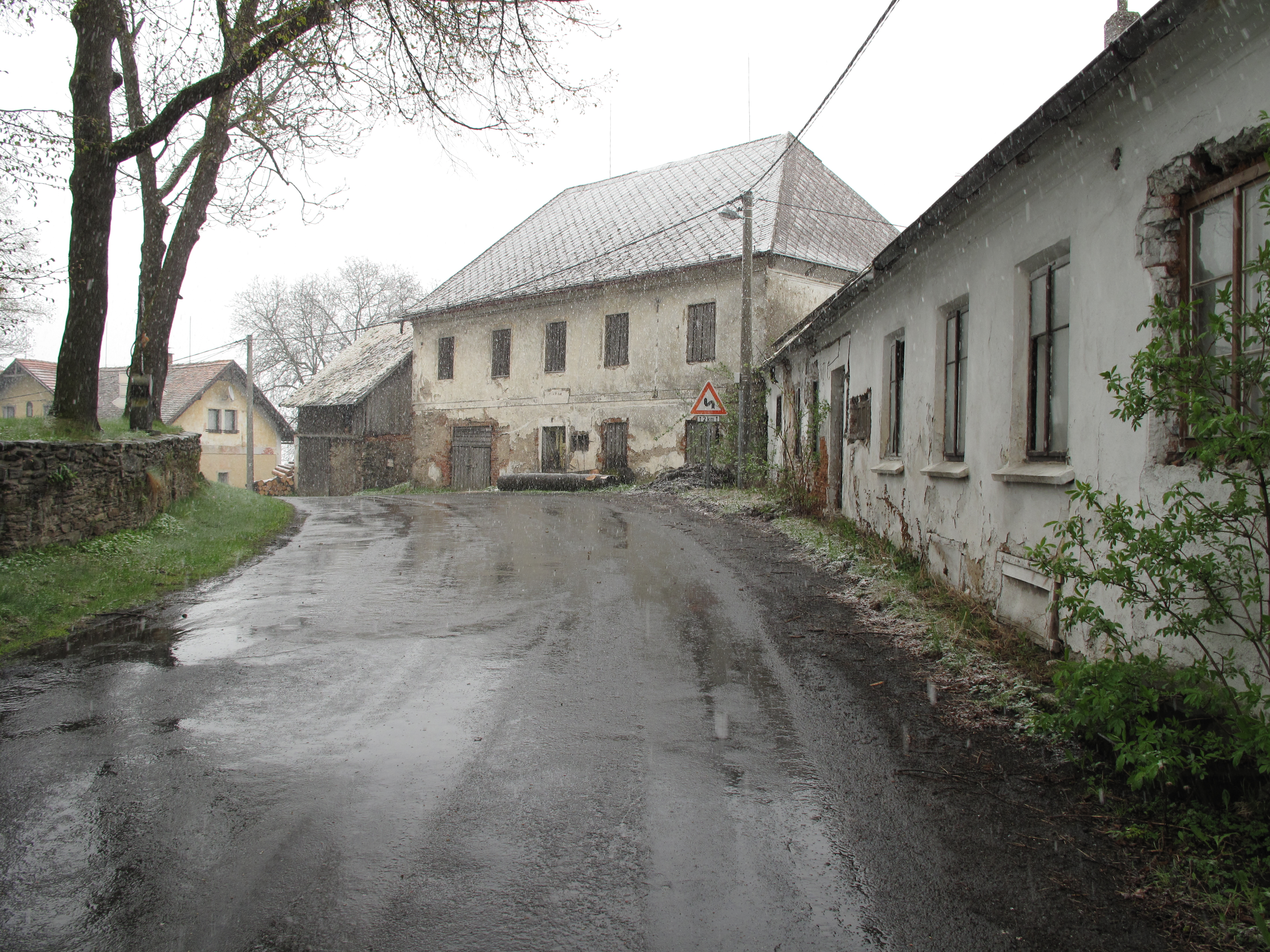 Oldřichovice (Dešenice). Okres Klatovy, Česká republika.